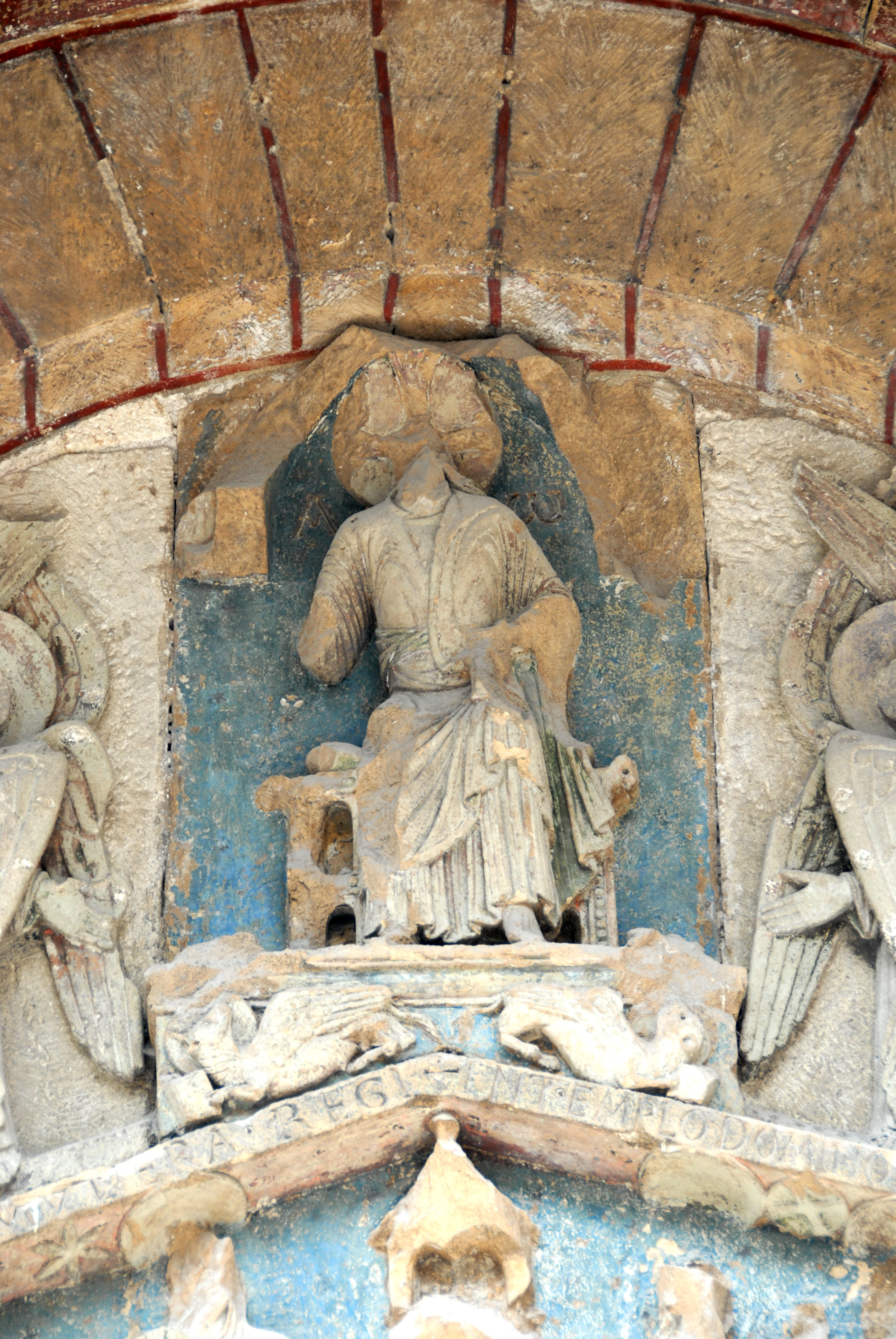 Notre-Dame du Port, Südportal, Tympanon, Motte